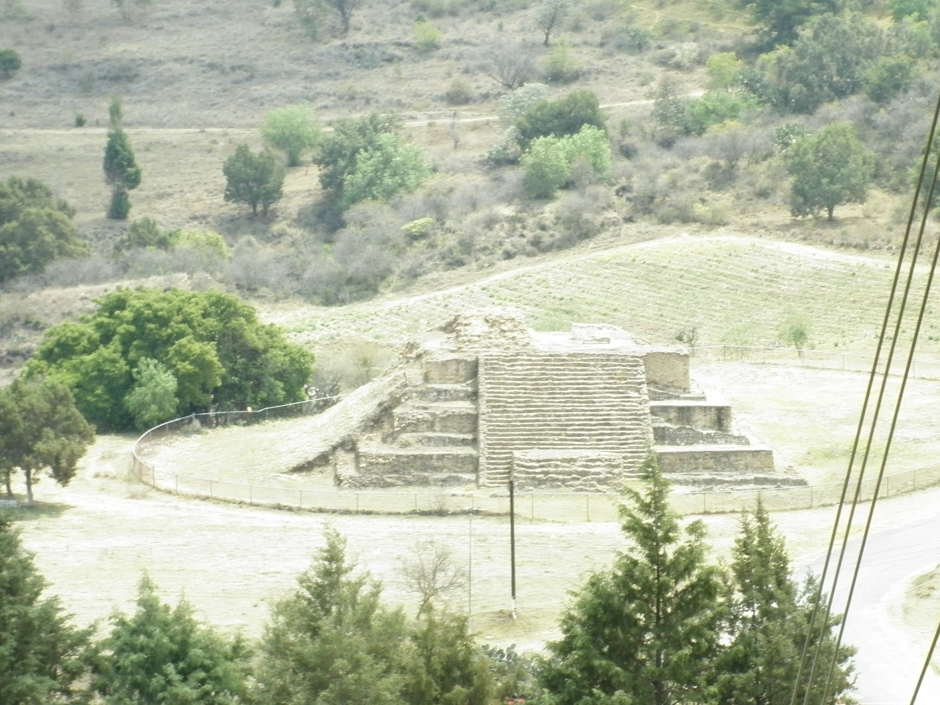 Fotografia de zona arqueológica.